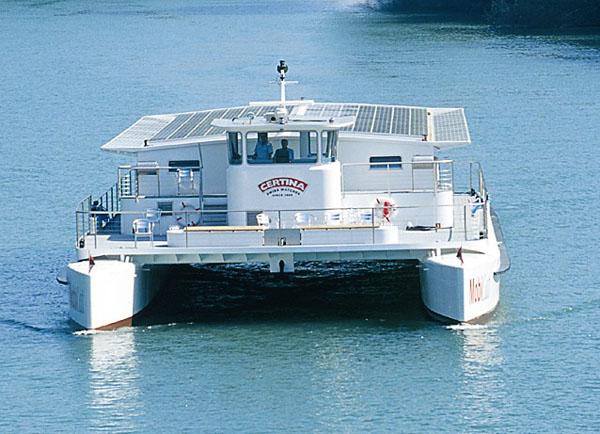 Solarkatamaran MobiCat